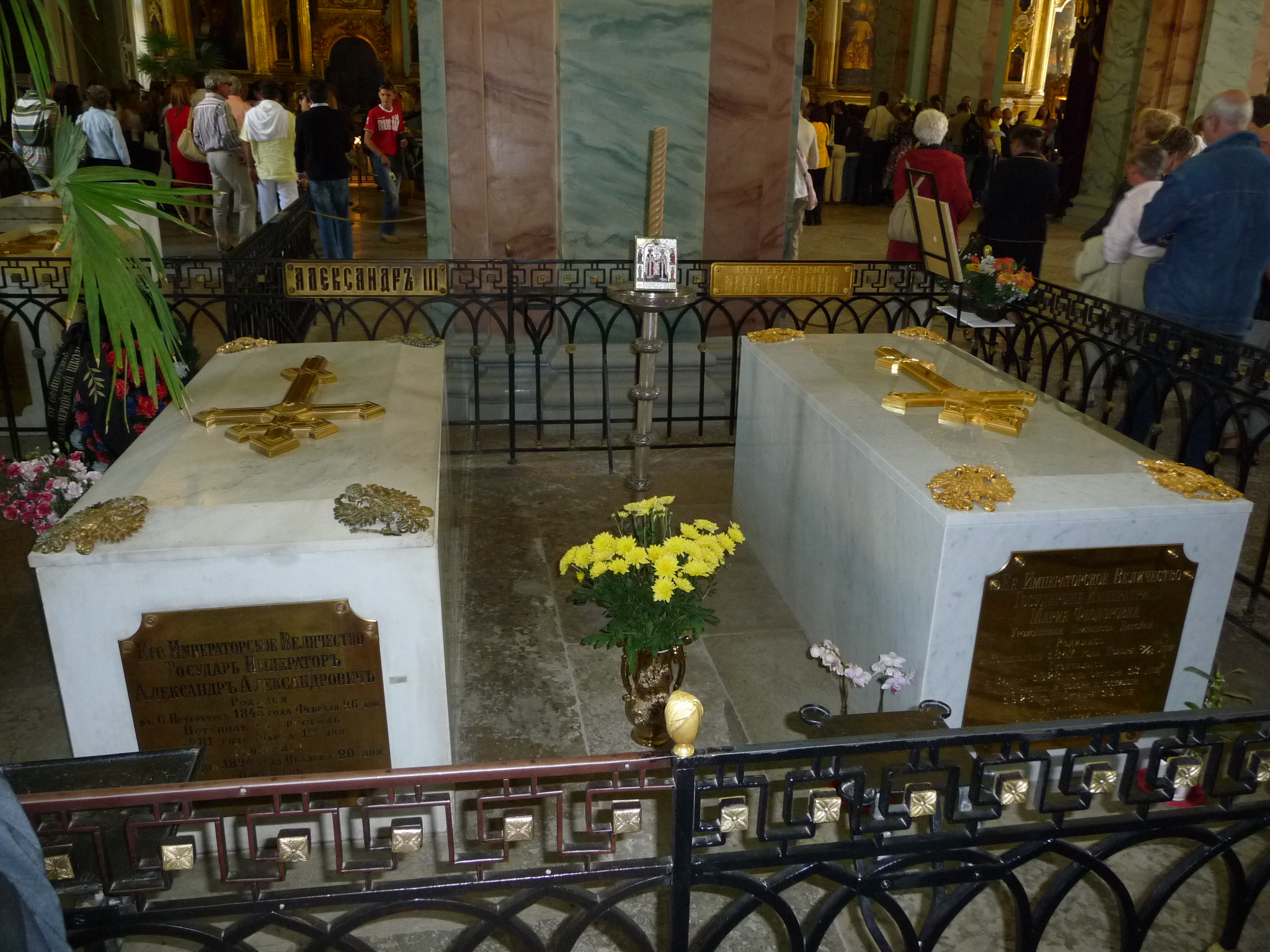 RussianTzarsTumbs-p1030593.jpg